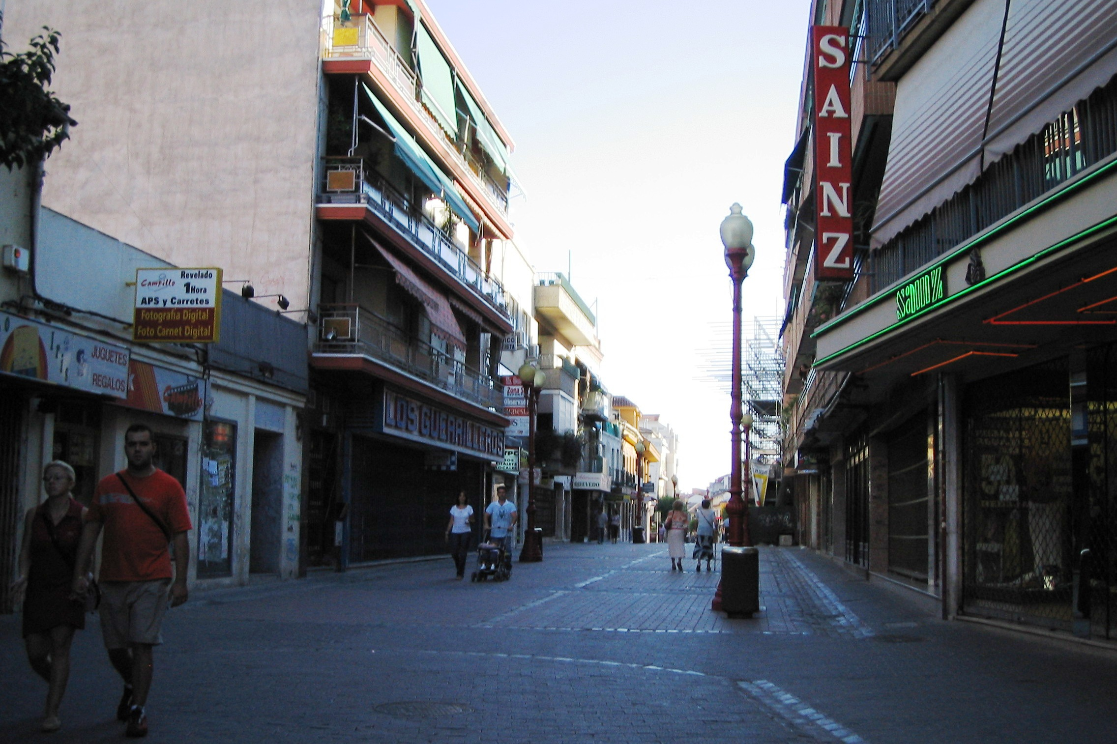 Centro de la ciudad madrileña de Getafe.